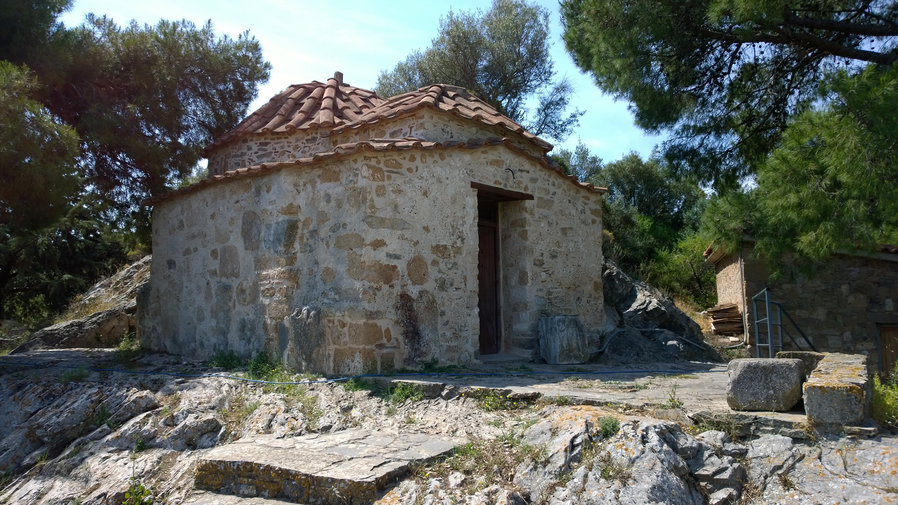 Agios Georgios in Vravrona Archaeological Site